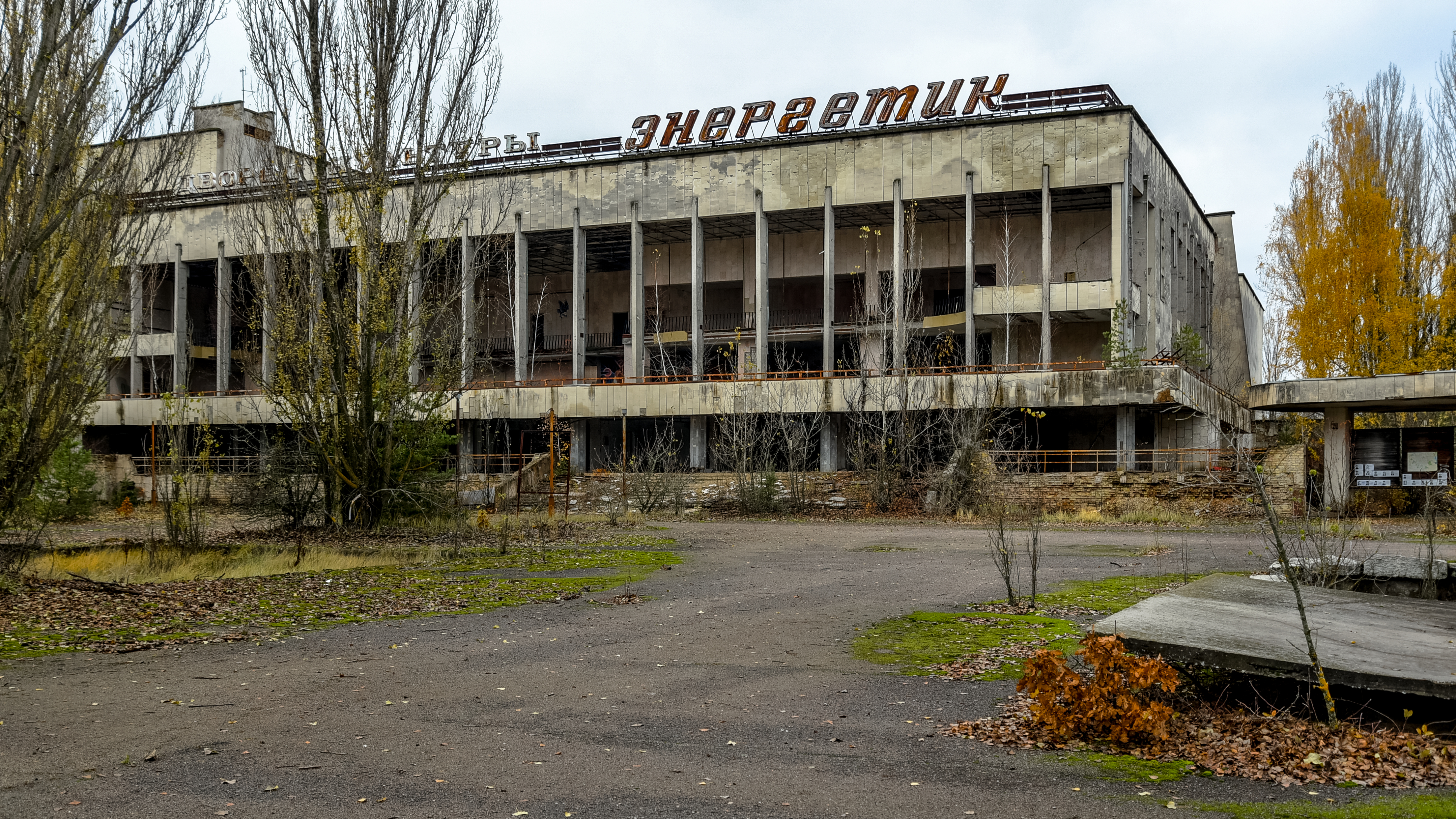 Pripyat (Ukraine)